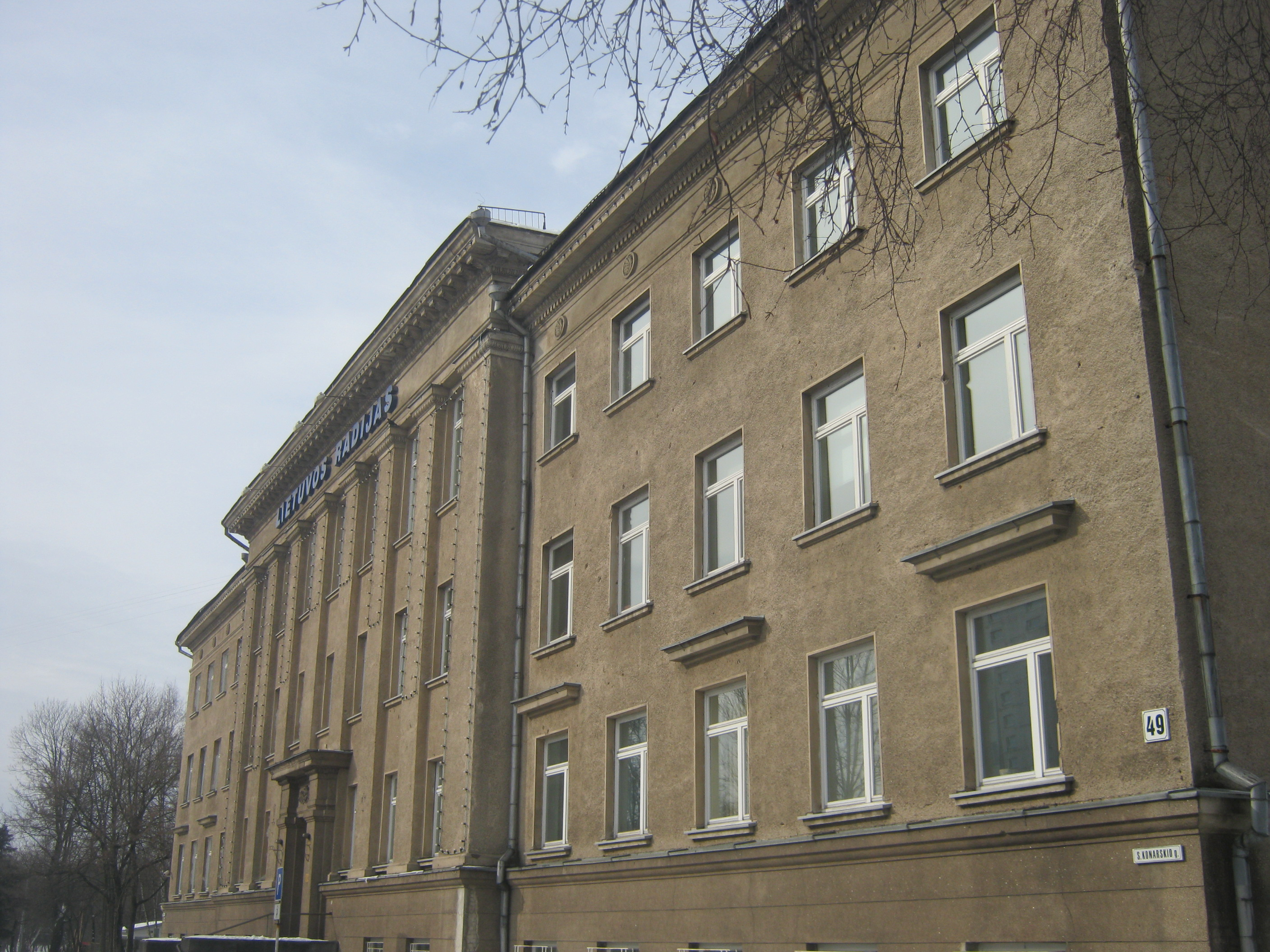 Naujamiestis, Vilnius